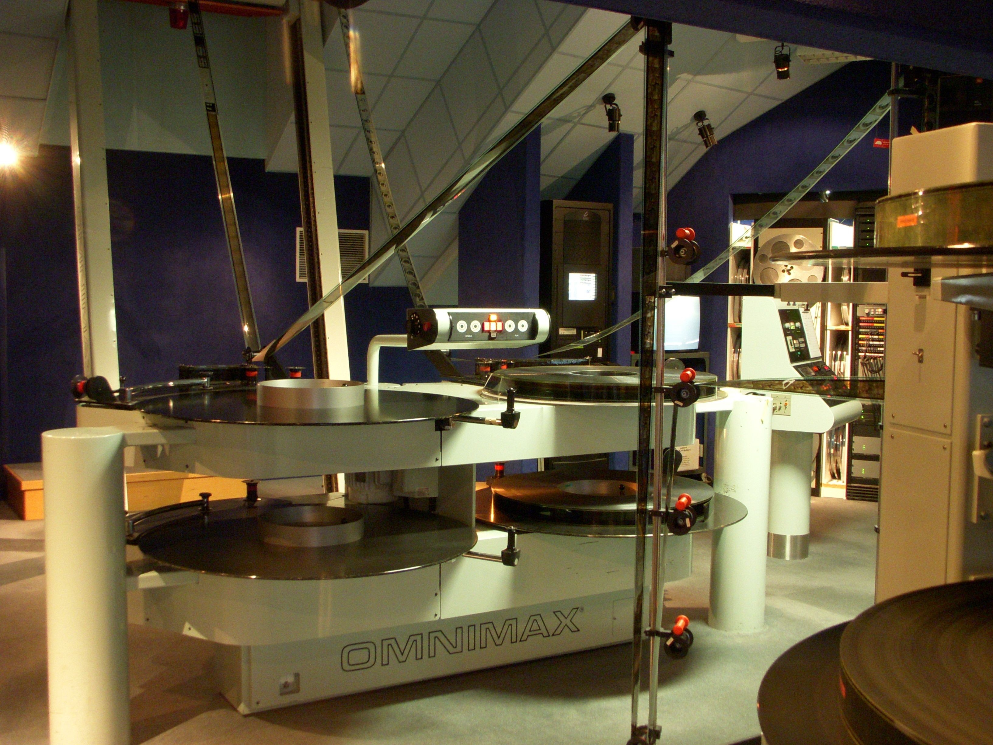 IMAX-biografen "Cosmonova" i Stockholm, maskinrummet